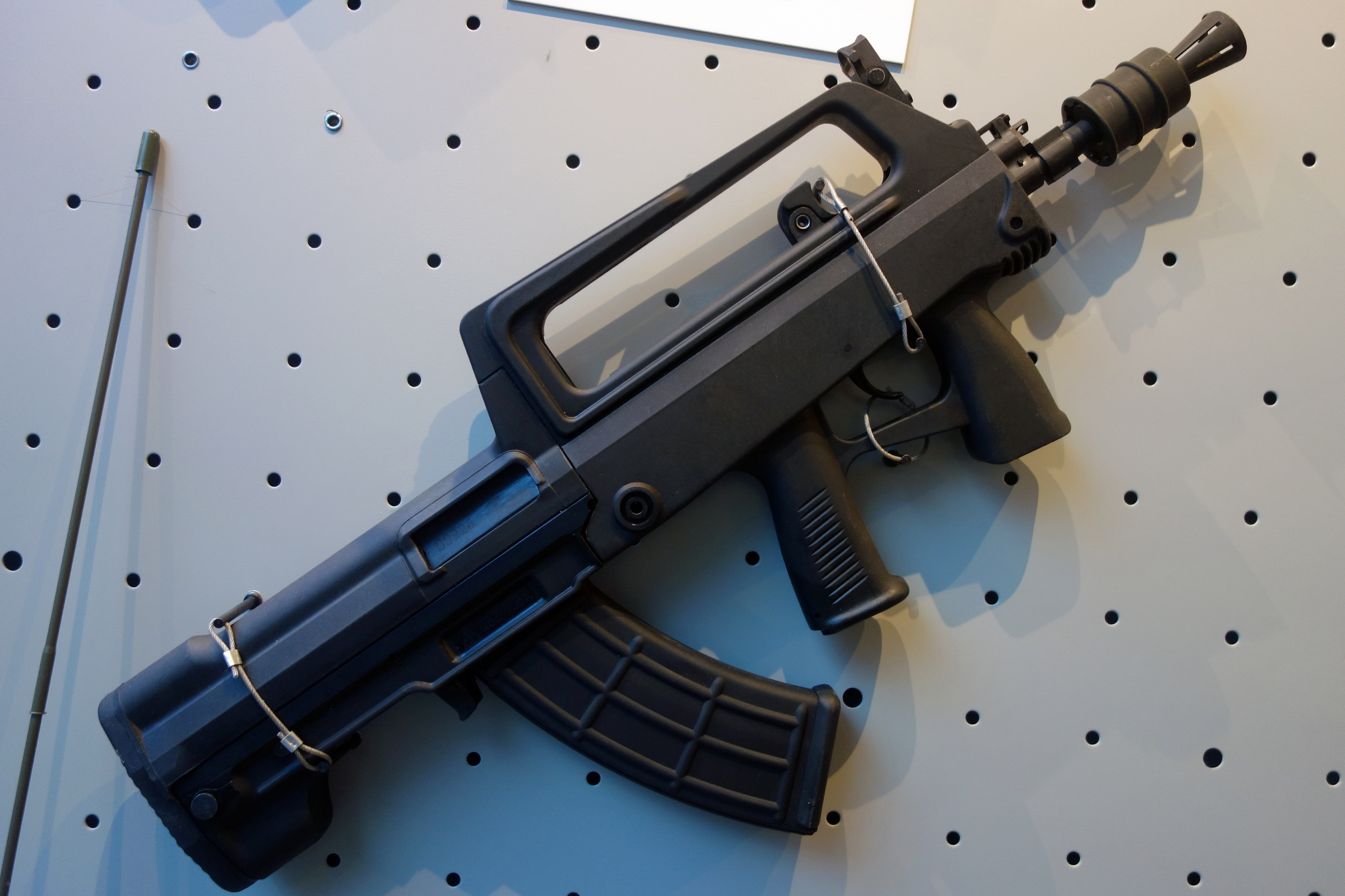 QBZ95B短突击步枪